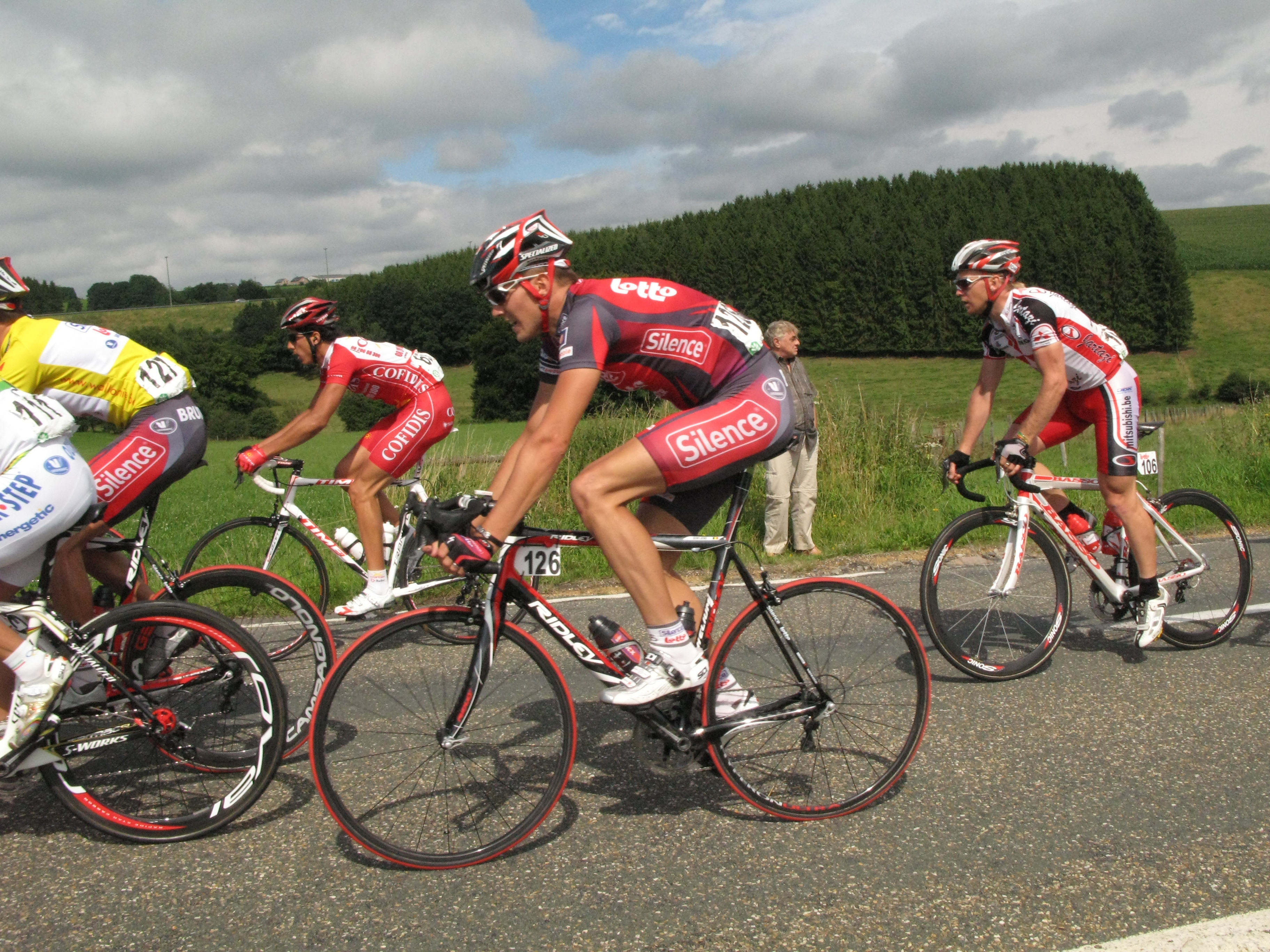 De Roy Sentges mat der Nummer 126 um Tour de Wallonie 2008 an der 4. Etapp.